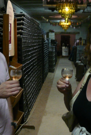 Dégustation en cave de Cheverny, Loire, France